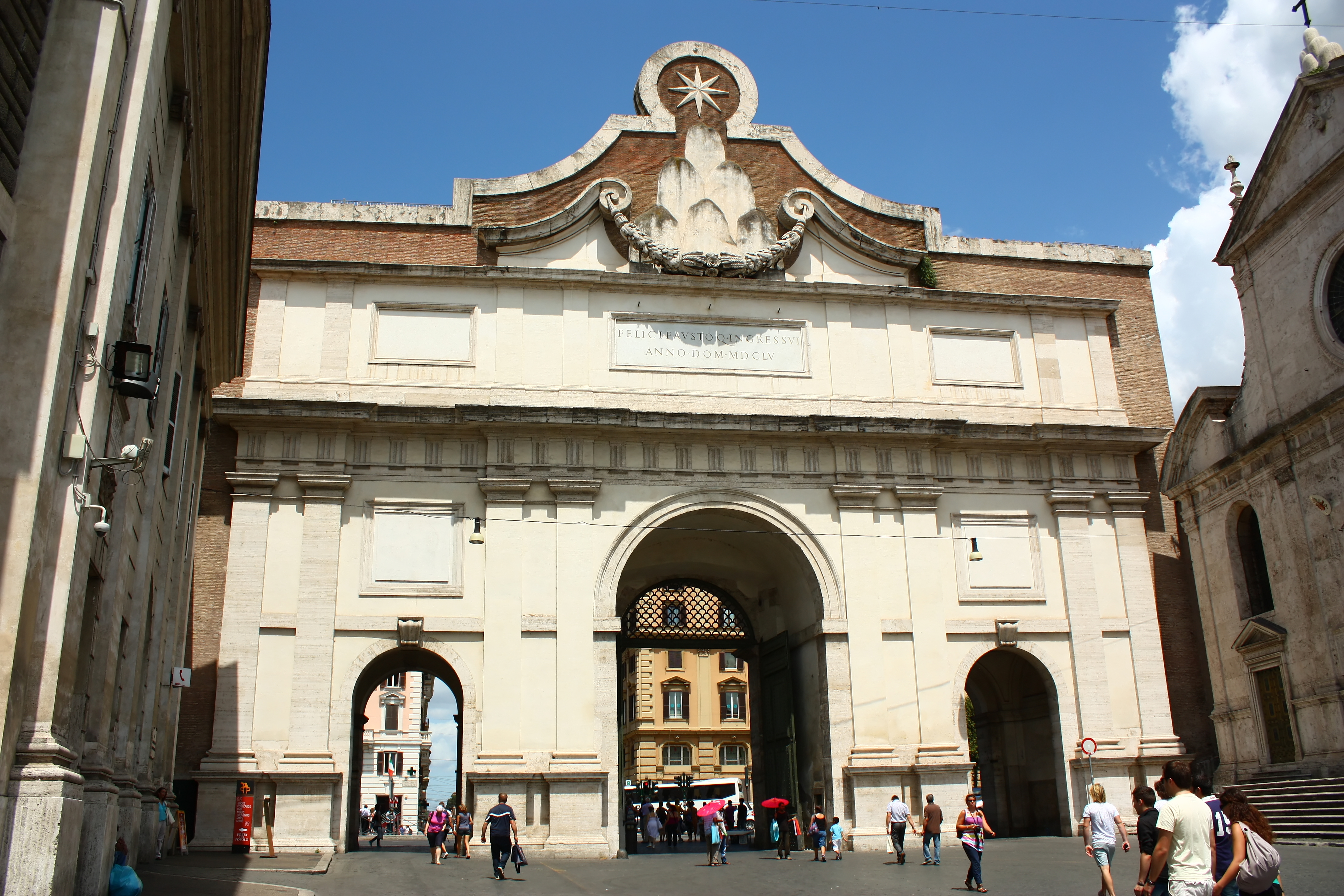 Façade intérieure de la Porta del Popolo, sur la Piazza del Popolo à Rome.